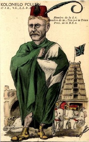 karikaturo de Jean-Robert pri Pollen, el bildkarto de ĉ. 1912